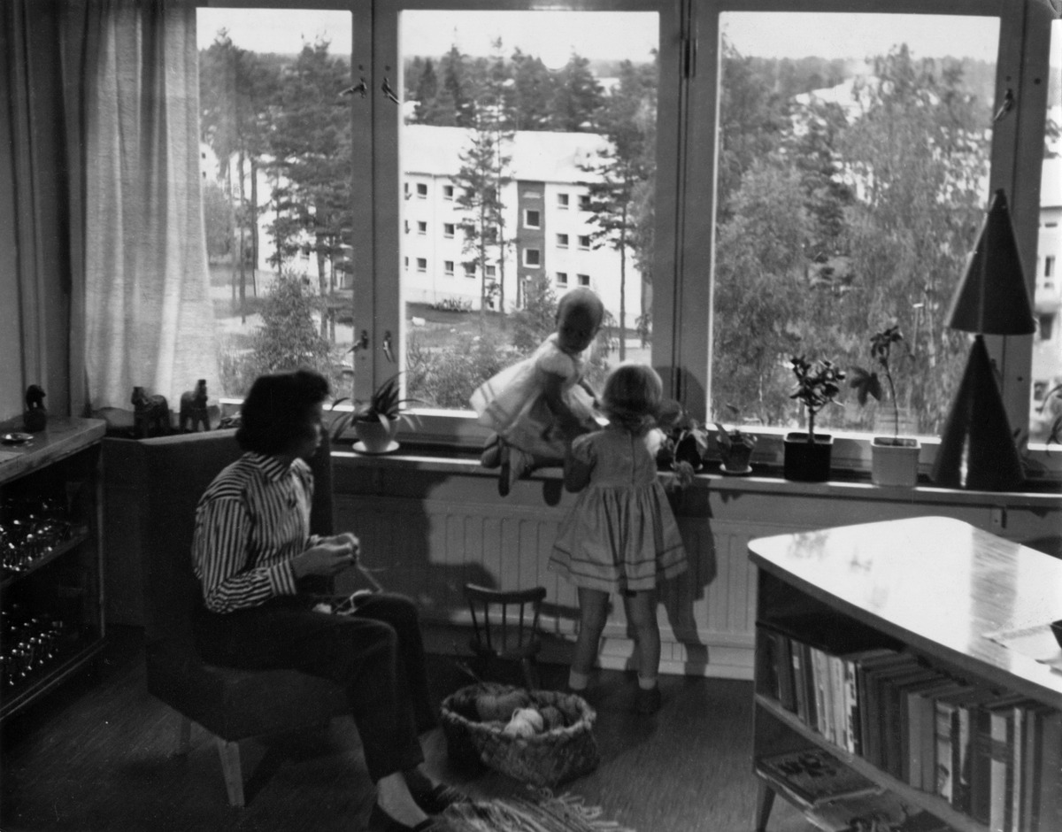 1957 - 1959 . Perhe-elämää uudessa lähiössä. Todennäköisesti valokuvaaja Olavi Mannosen koti, Roihuvuorentie 18 A. Ikkunasta näkyy kerrostalo, Roihuvuorentie 9.